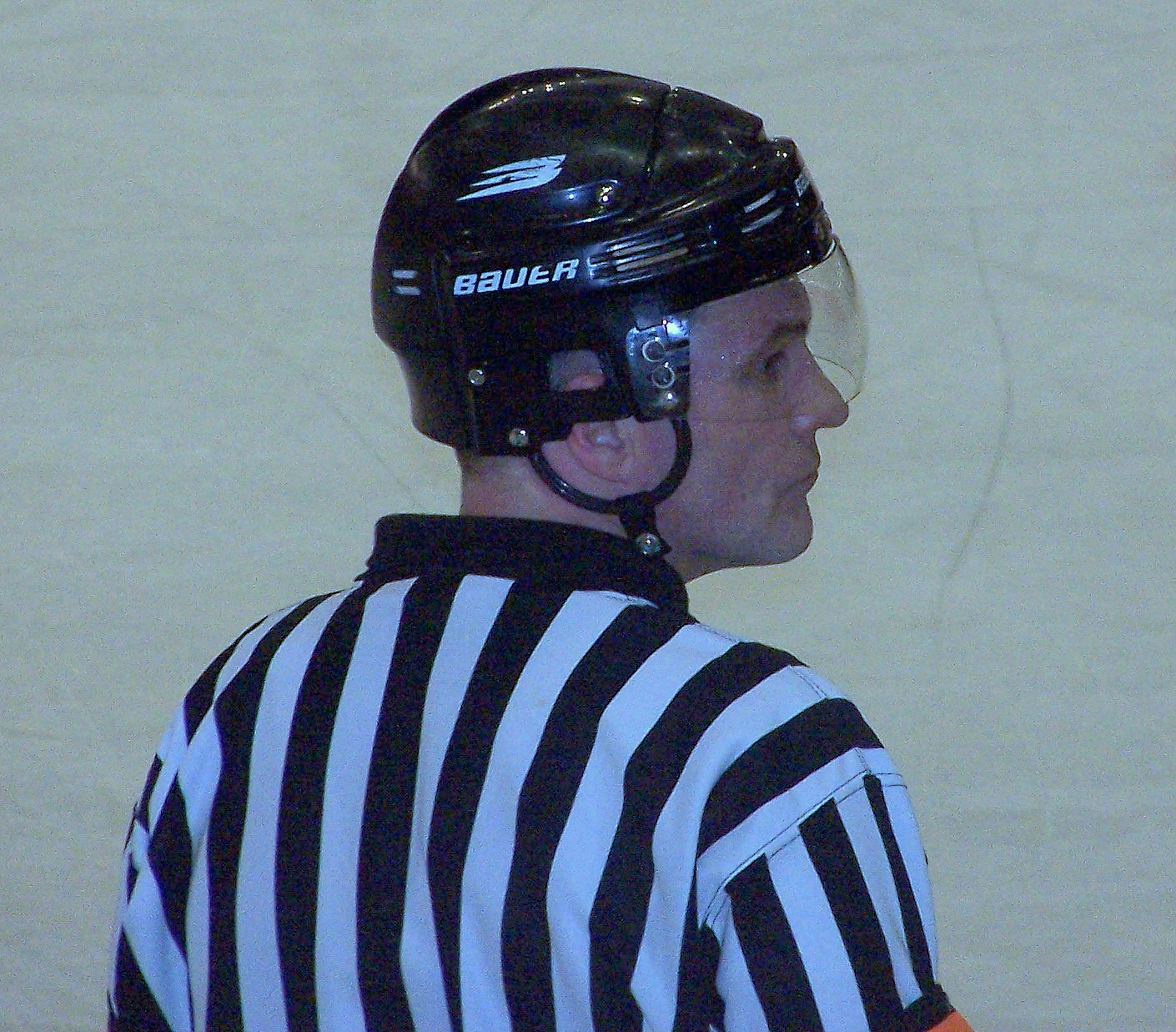 Sędzia hokejowy Krzysztof Rzerzycha. Mecz towarzyski Polska-Węgry (2:4), Arena Sanok 12.04.2006.